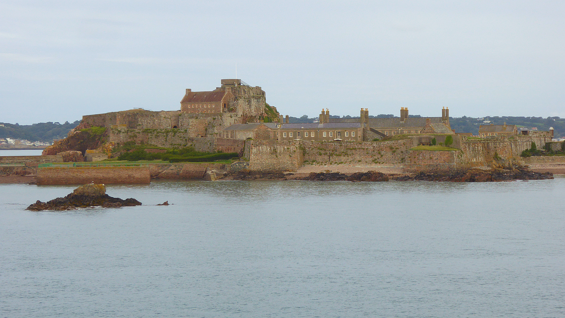 Elizabeth Castle Island St Helier Insel Jersey Channel Islands United Kingdom - Foto 2017 Wolfgang Pehlemann P1170258.jpg